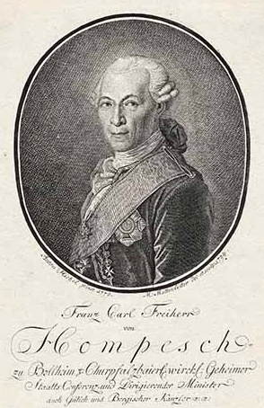 Franz Karl Joseph Anton von Hompesch zu Bolheim (1735-1800) kurpfälzischer und pfalz-bayerischer Minister